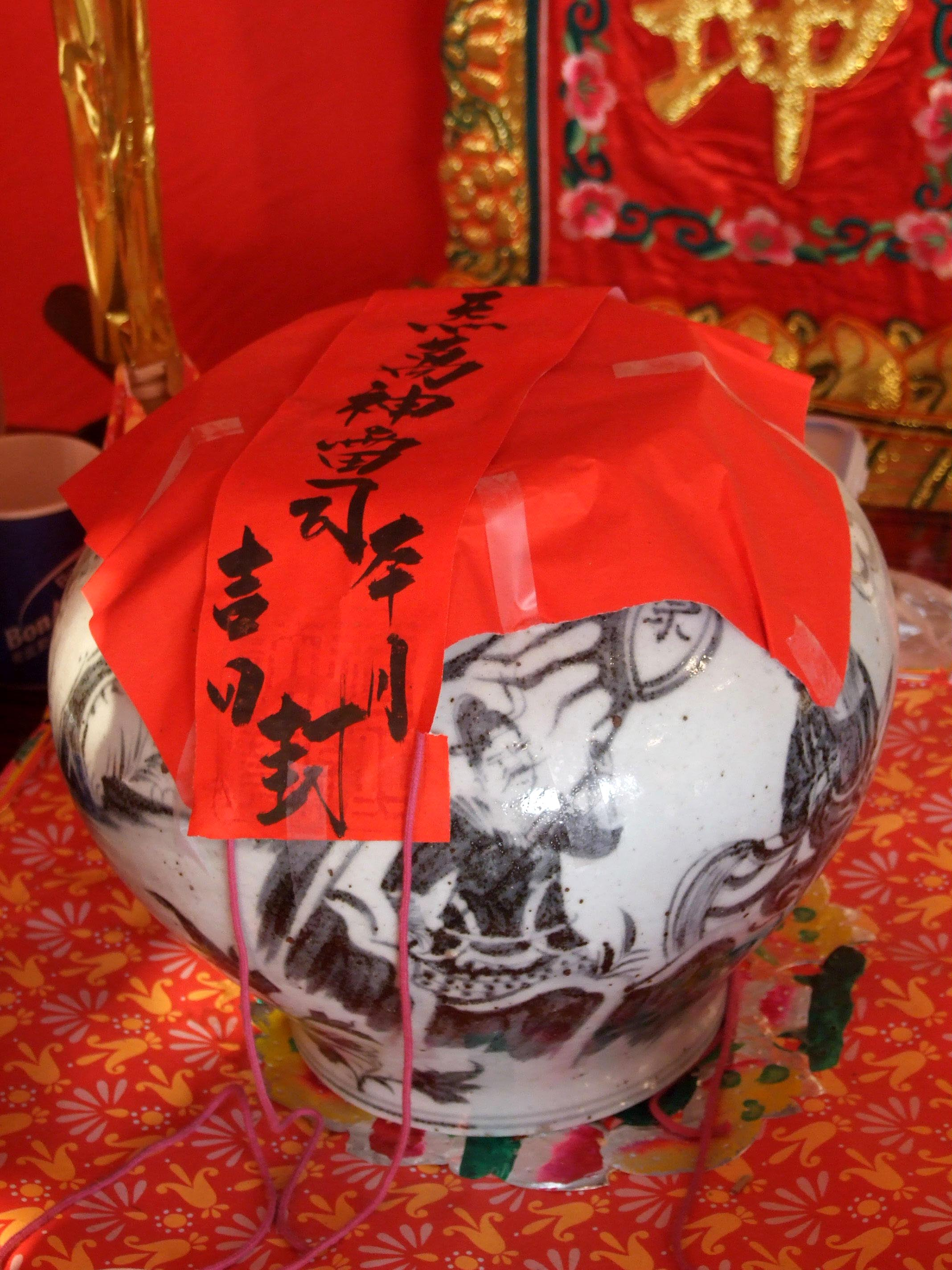 中文（香港）: 粉嶺太平清醮「取水」封存在神壇